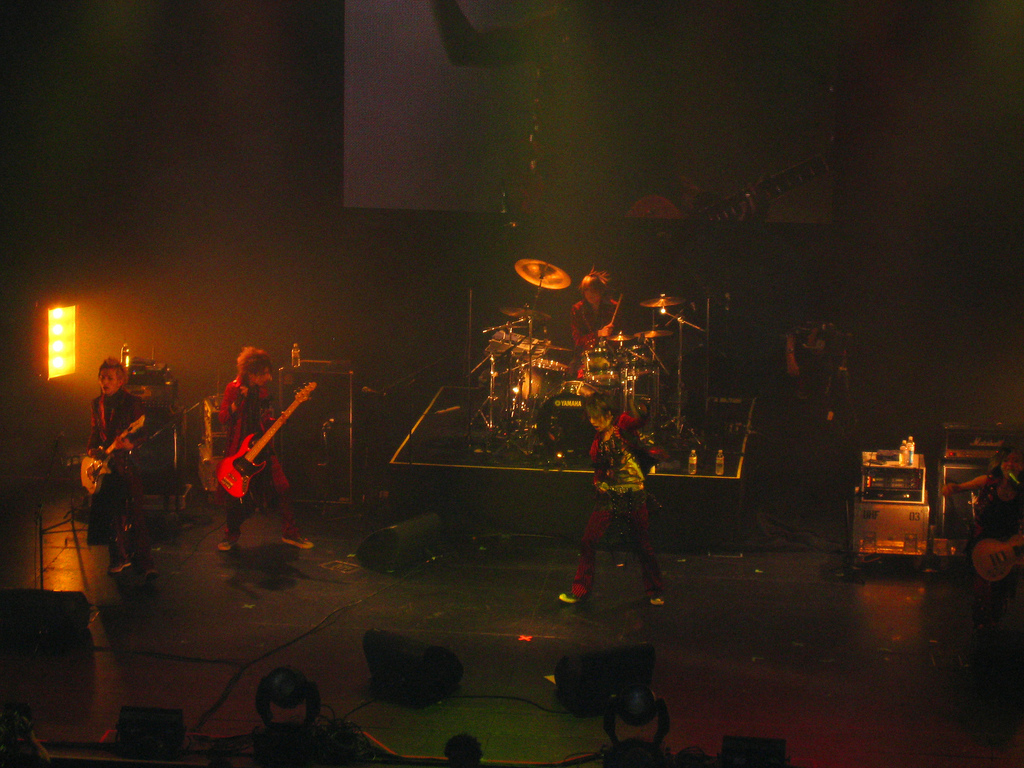 alicenine.